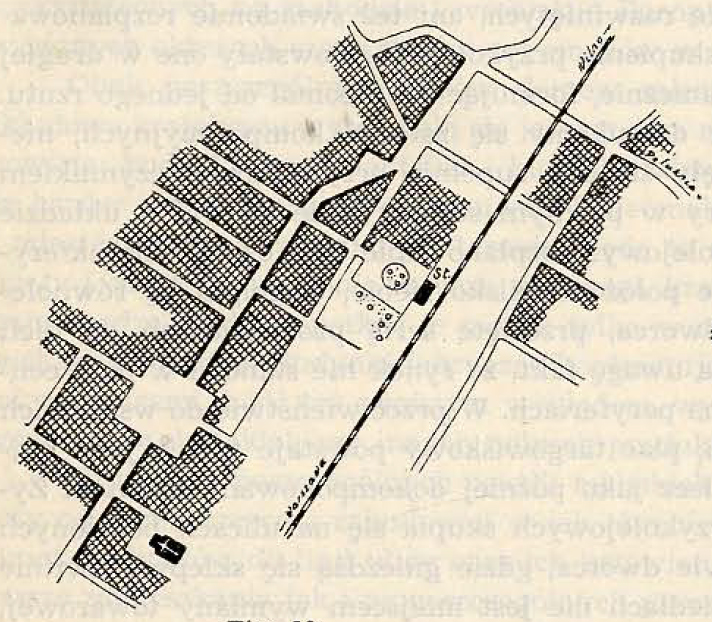 Беларуская (тарашкевіца): Рудзішкі (Rudziški). Плян